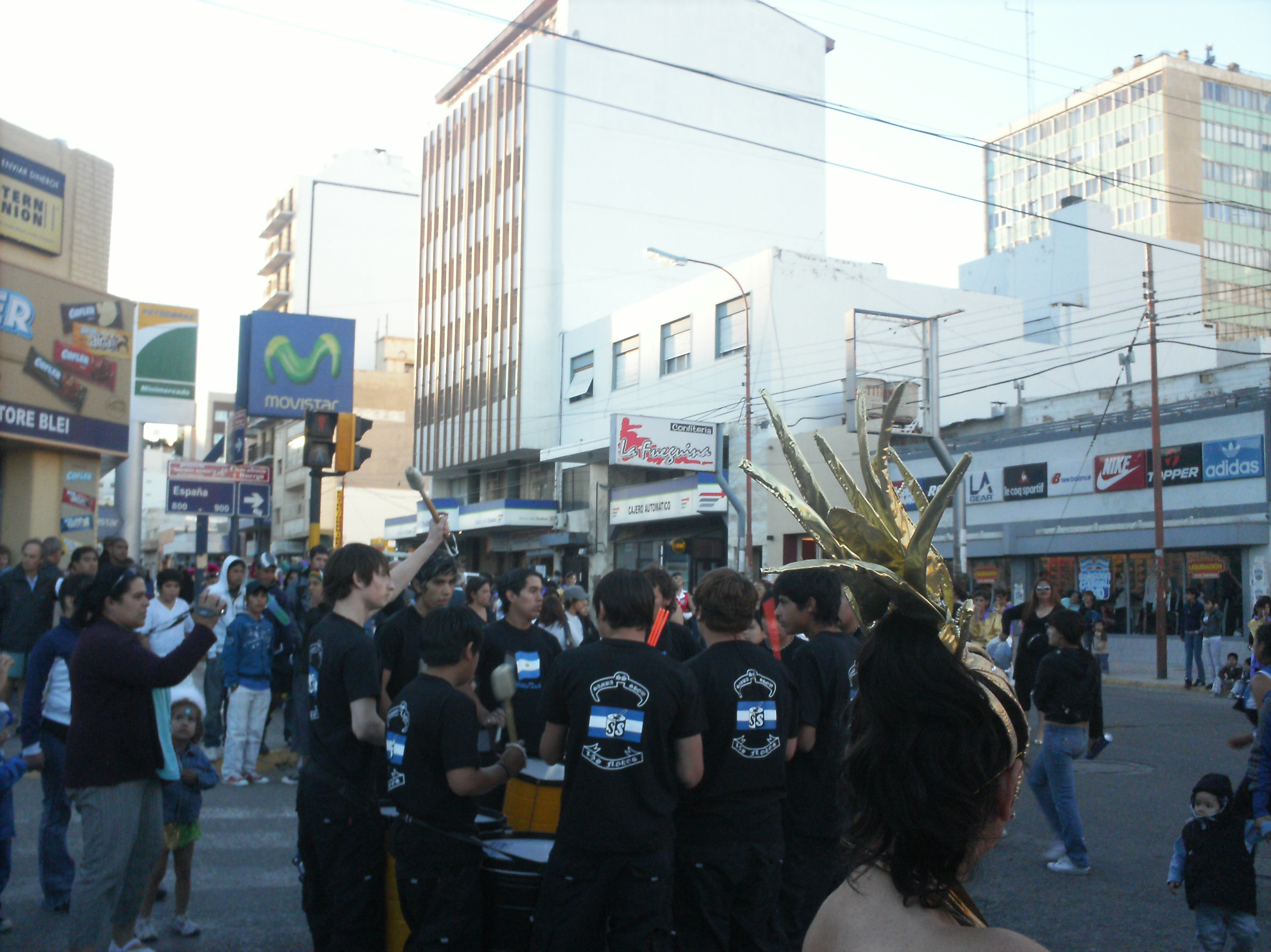 En el microcentro comodorense pleno carnaval